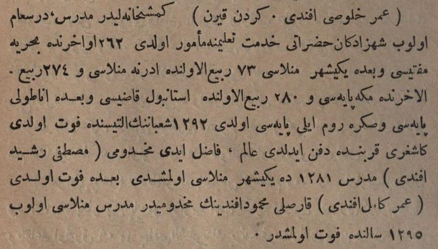 Sicill-i Osmanî'de Gerdankıran Ömer Hulusi Efendi